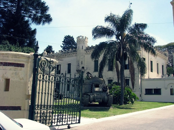 Museo Histórico del Ejército Argentino. Ciudadela.